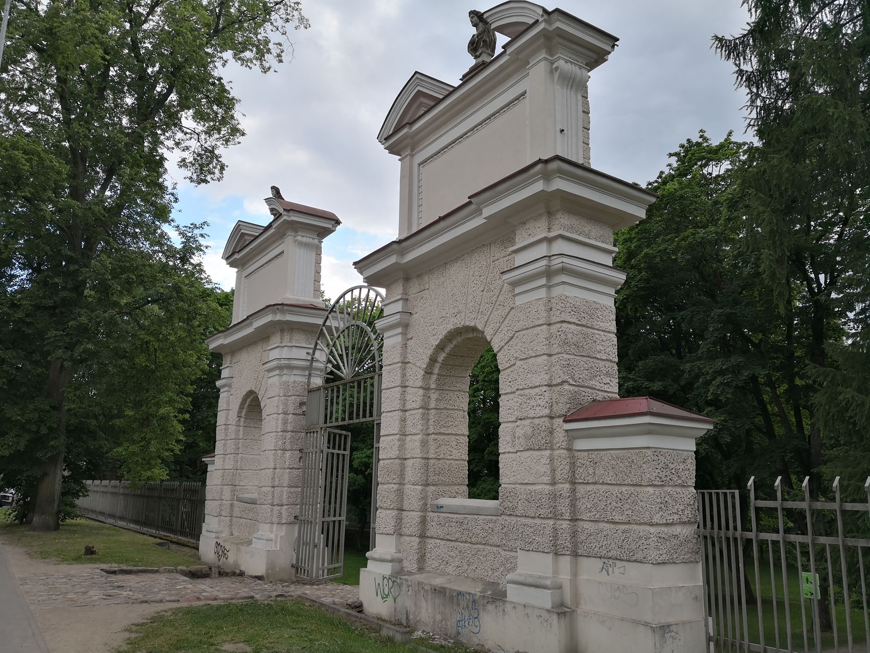 Sapiegų rūmų parko vartai iš rytų pusės, priešais rūmus, 2018 m. pavasarį. G. Kulikausko fotografija.